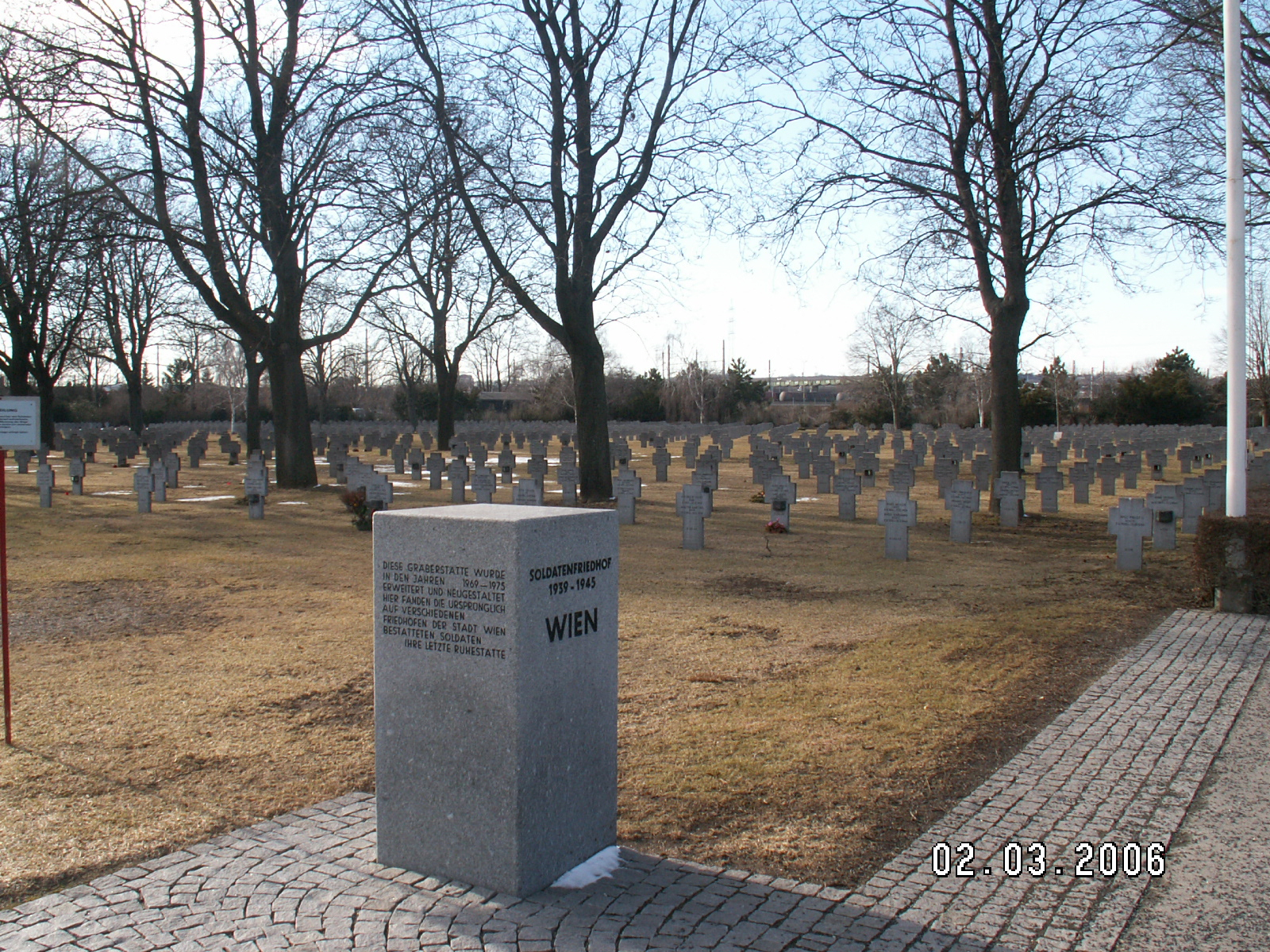 Soldatenfriedhof der Gefallenen des 2. Weltkrieges am Wiener Zentralfriedhof selbst fotografiert